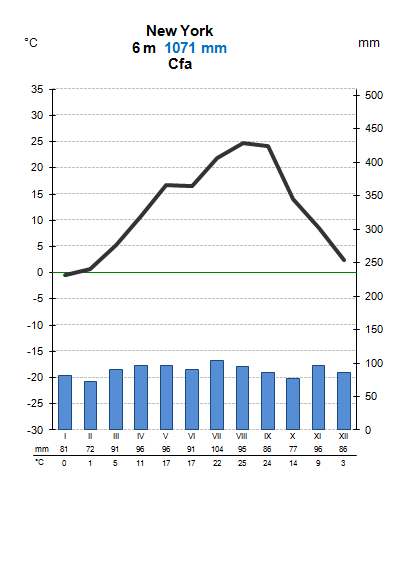 New Yorgi kliimadiagramm